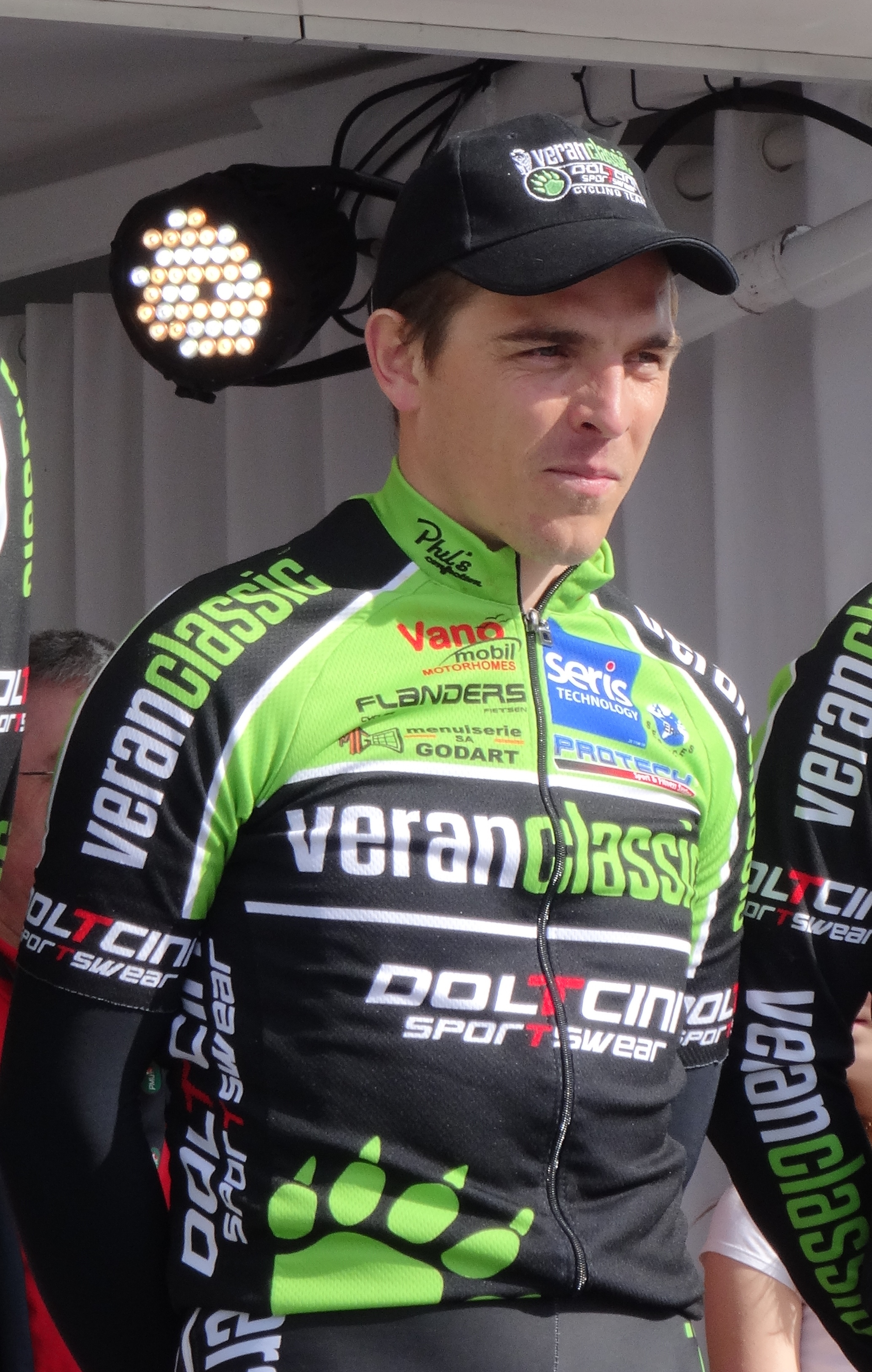 Reportage réalisé le jeudi 17 avril à l'occasion du départ et de l'arrivée du Grand Prix de Denain 2014 à Denain, Nord, Nord-Pas-de-Calais, France.